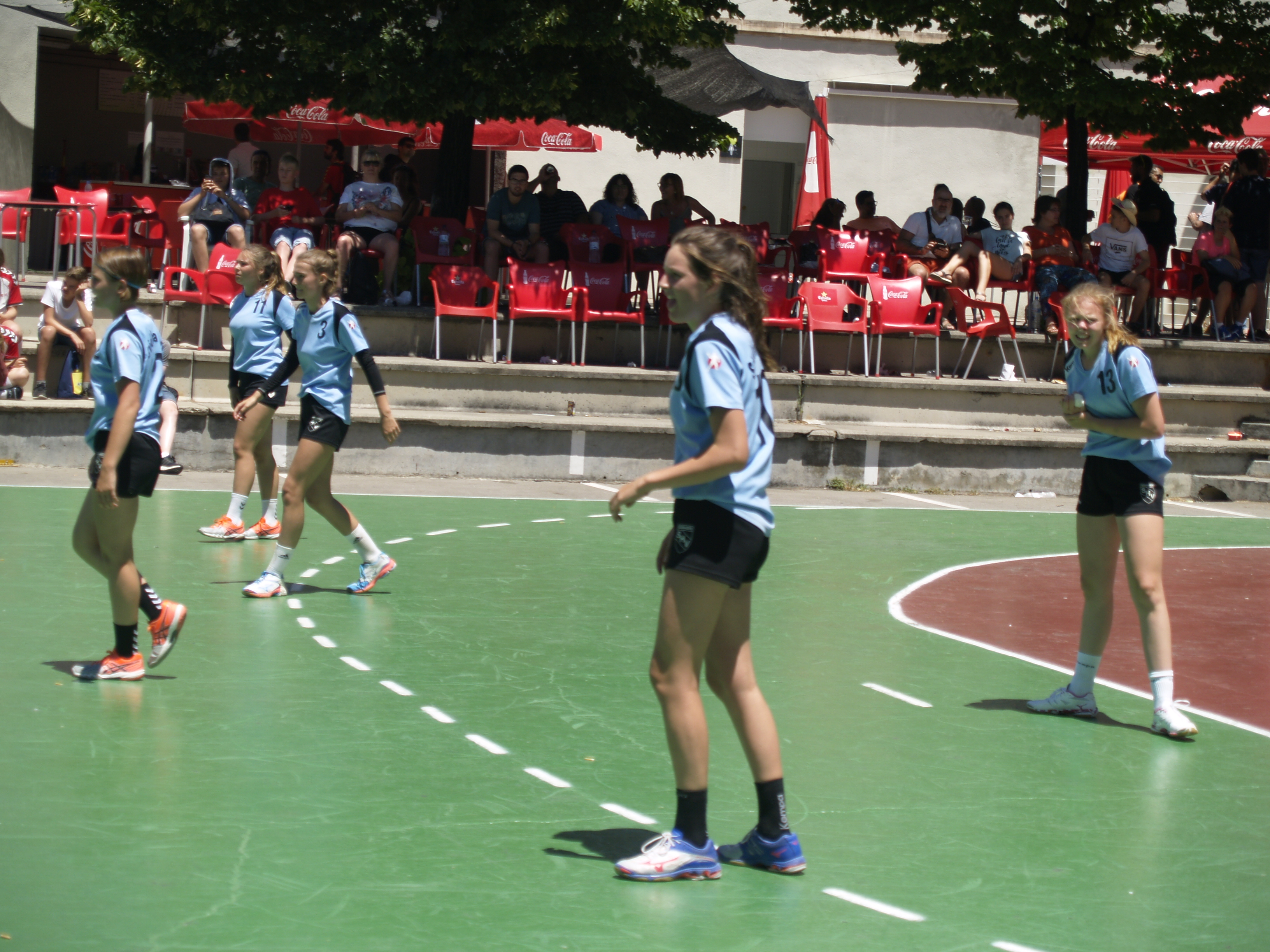 Granollers Cup. Semifinal infantil femenino (2003-04)